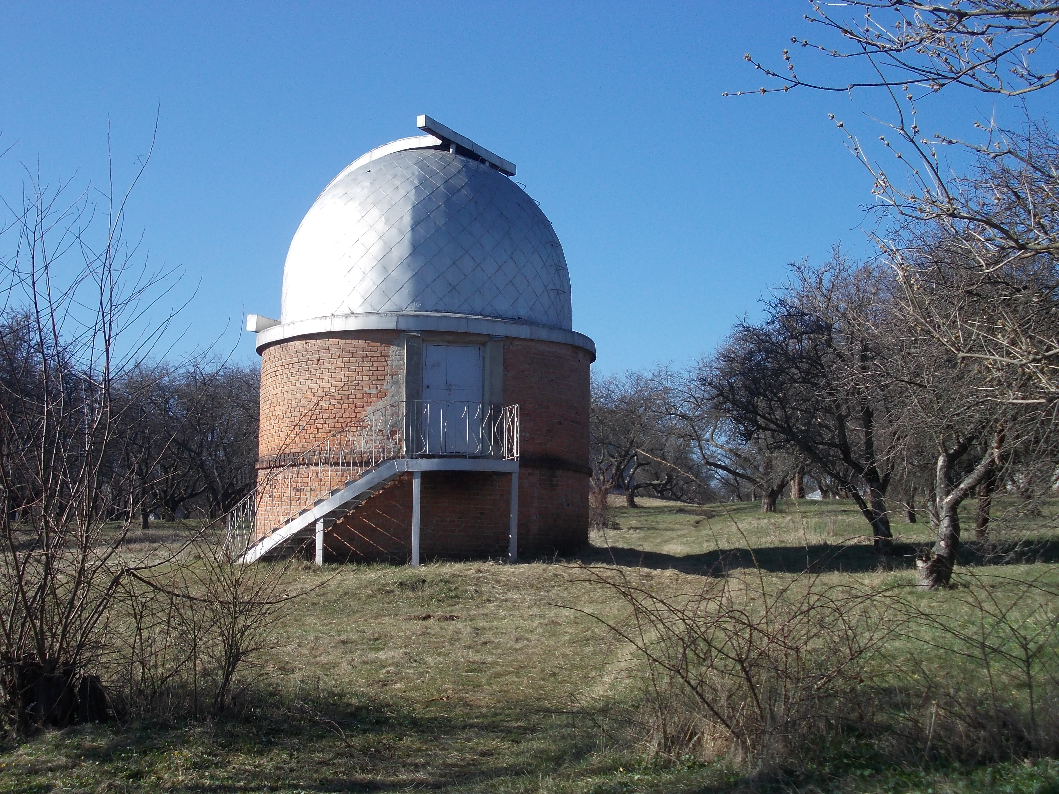 Місто Полтава. Територія Полтавської гравіметричної обсерваторії. Один із павільонів.